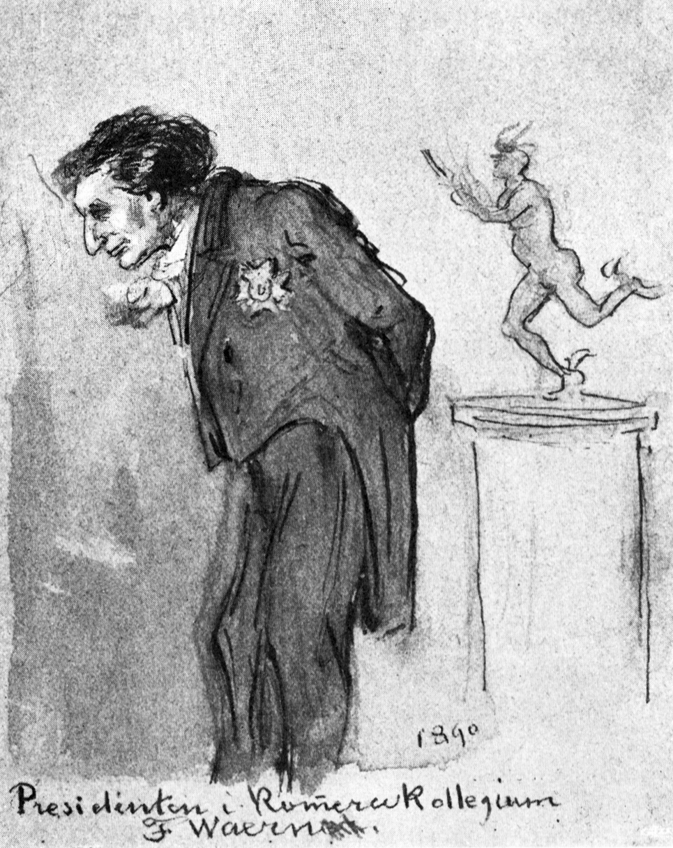 Carl Fredrik Wærn (1819–1899)